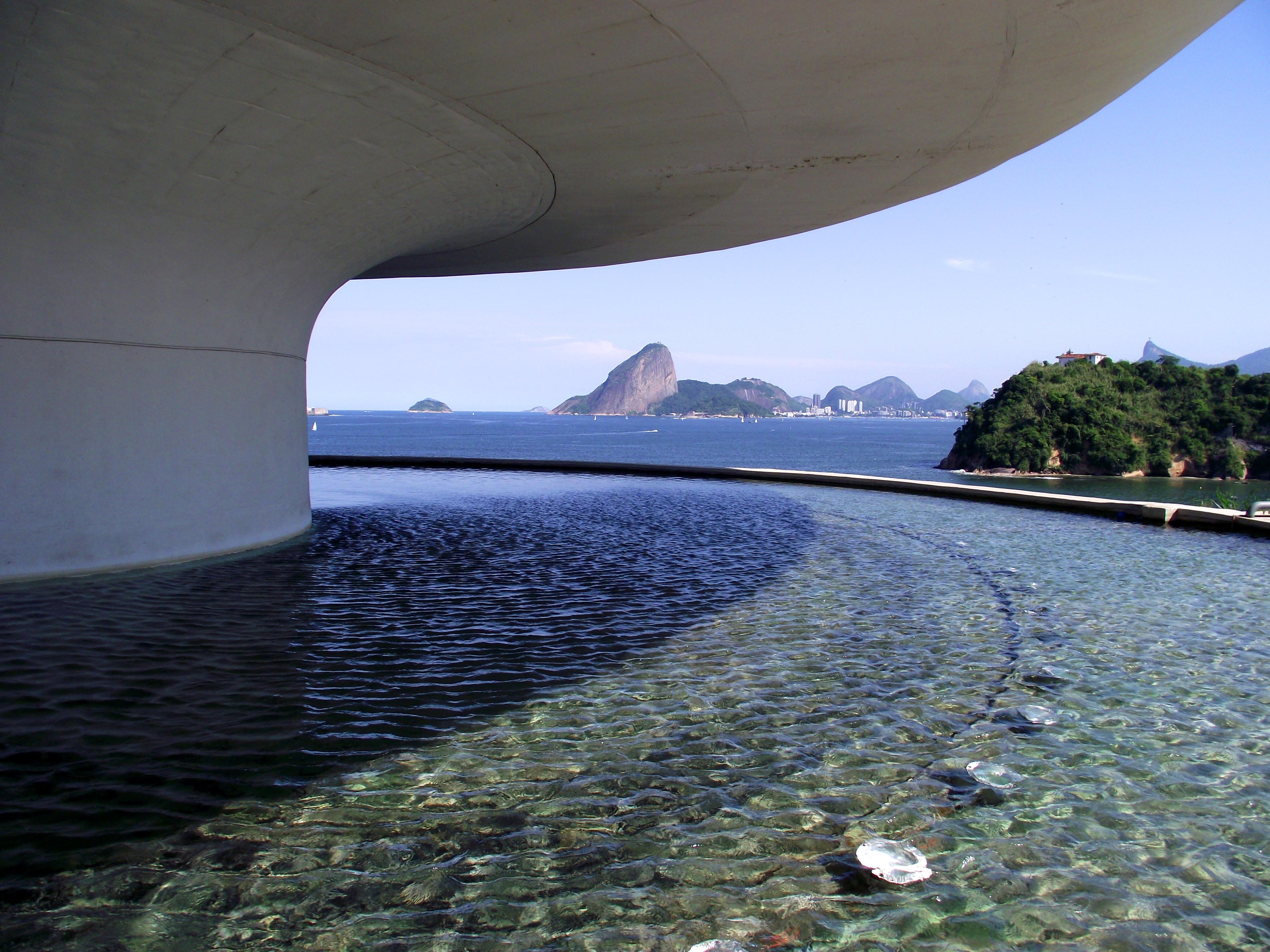 MAC - Niterói